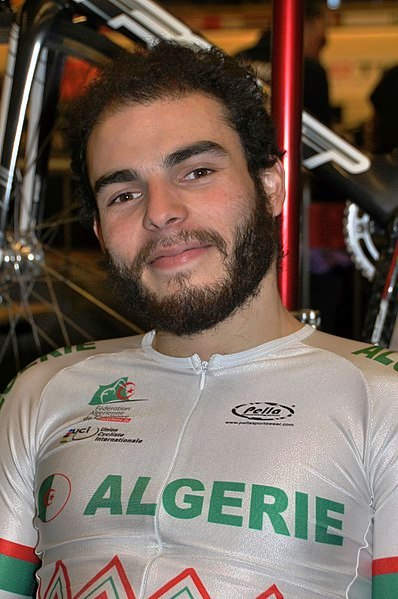 Yacine Chalel, algerischer Radsportler